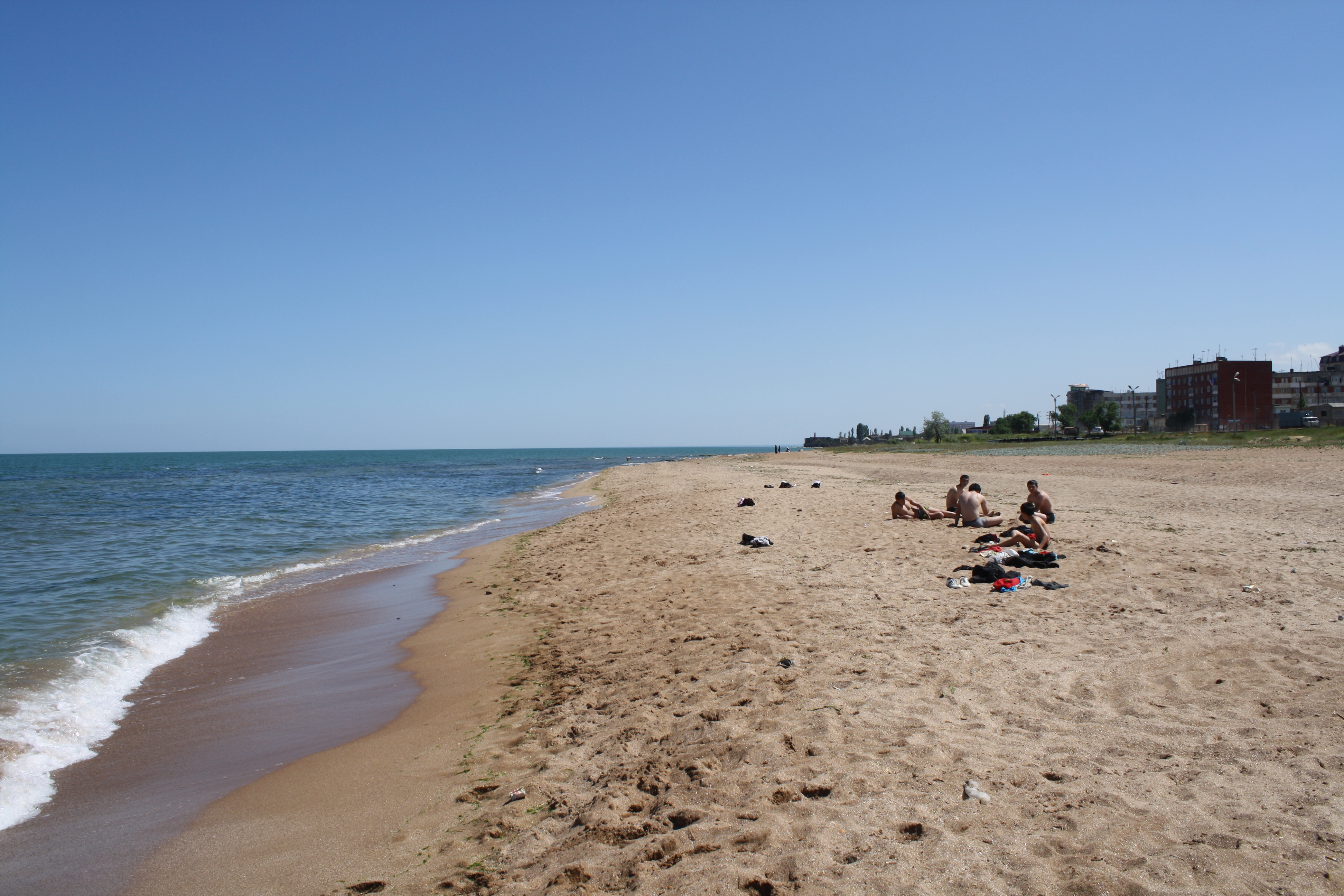 Derbent beach. Dagestan. Russia. Пляж города Дербент. Дагестан. Россия